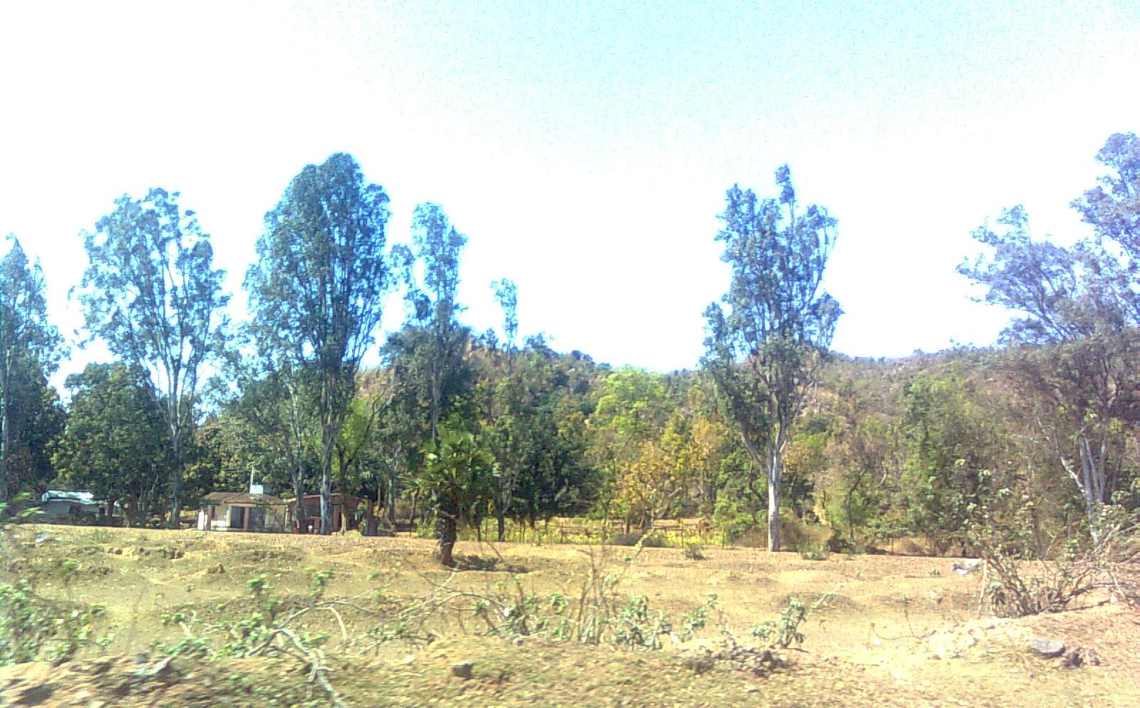 टुंडी